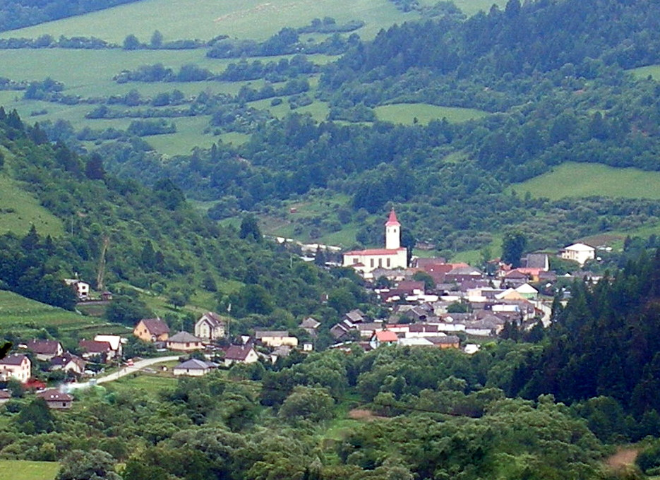 Obec Šindliar